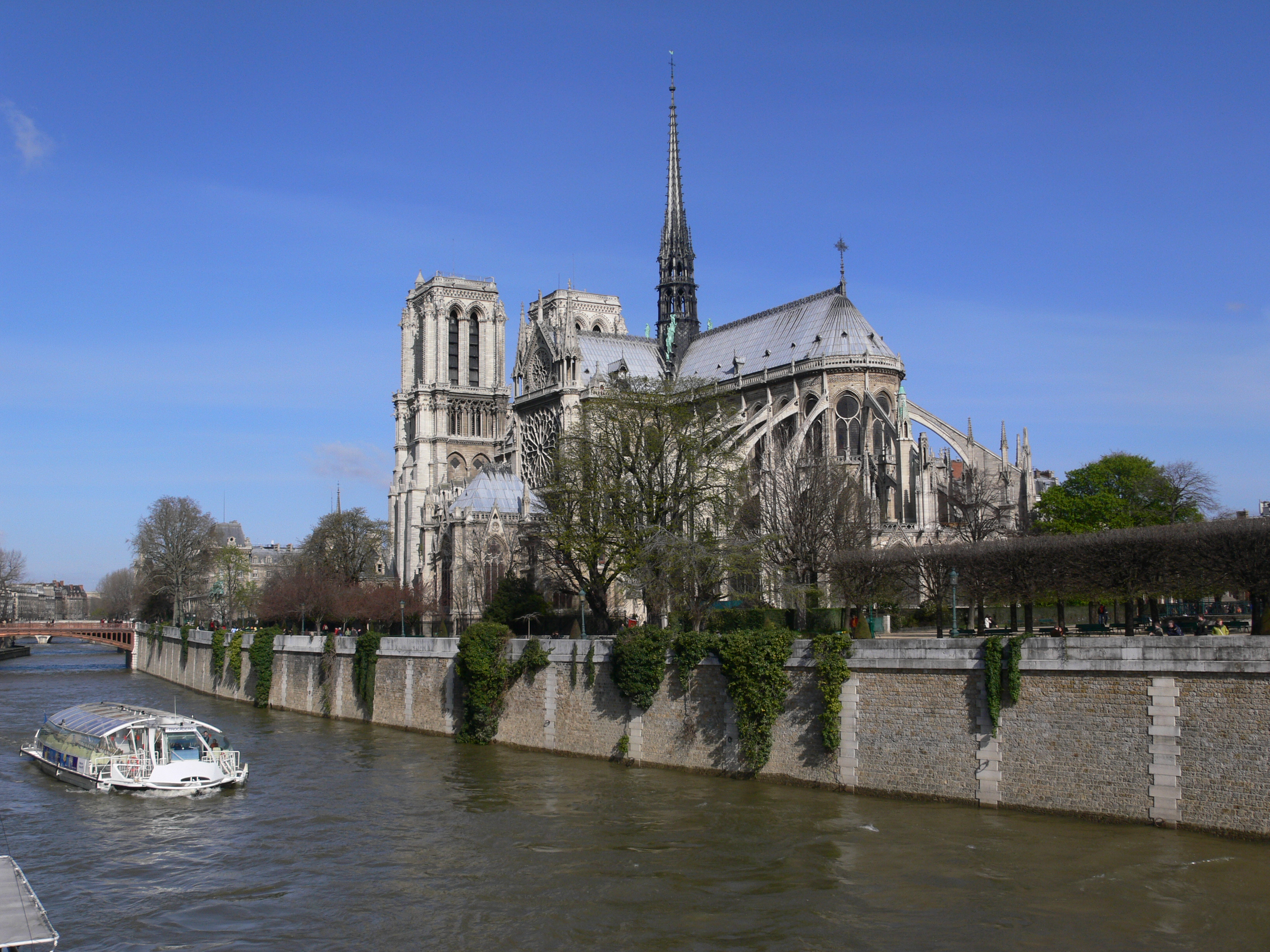 Cathédrale Notre-Dame de Paris, vu du Pont de l'Archevêché